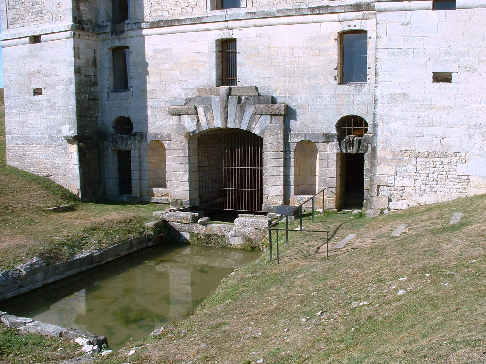 Château de Maulnes, Cruzy-le-Châtel, Yonne - le bassin